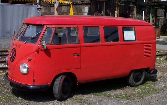 VW Bus i Feuerwehr red, photo by Stahlkocher, GFDL